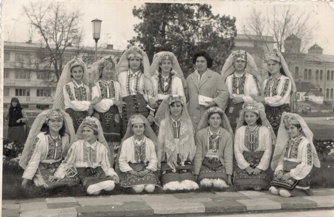 в републиканско първенство гр.Ямбол през 1972г. с ръководител Савина Маринова